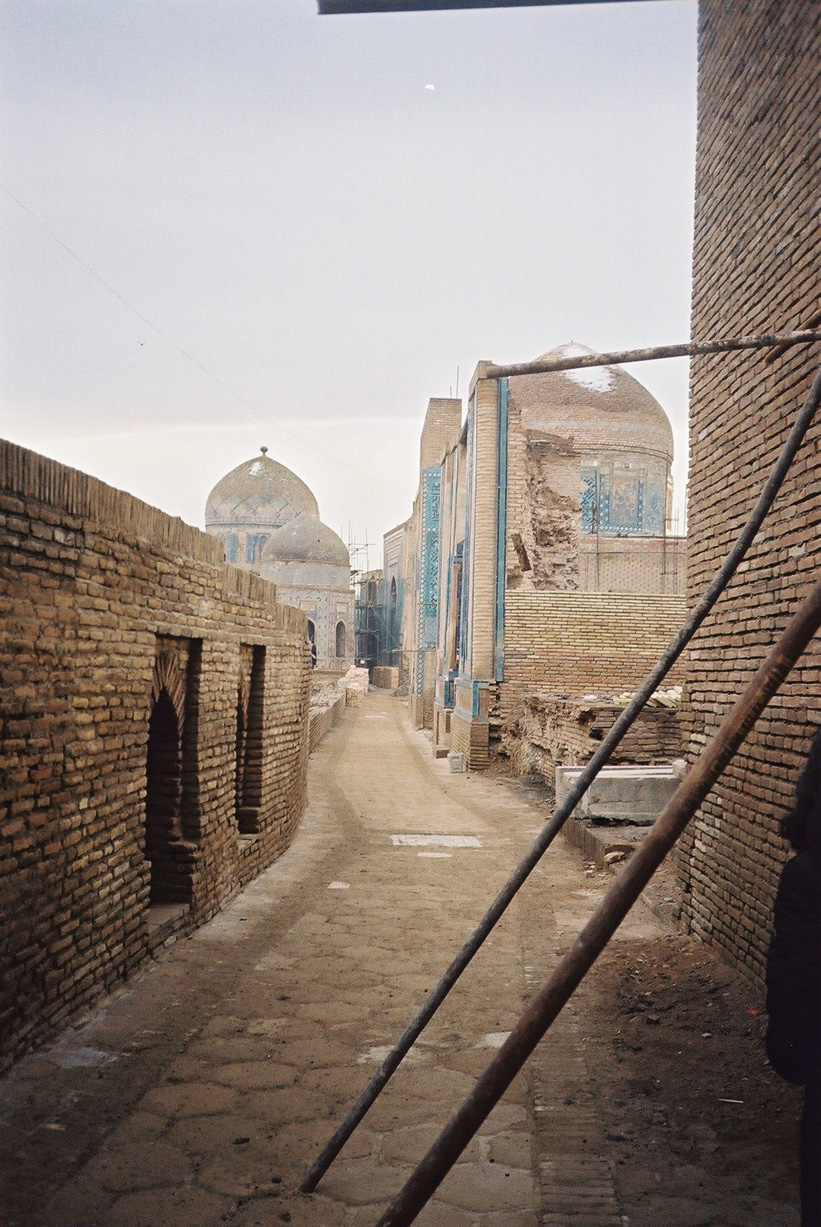 Alley in Shahr-i-Zindah, Samarkand